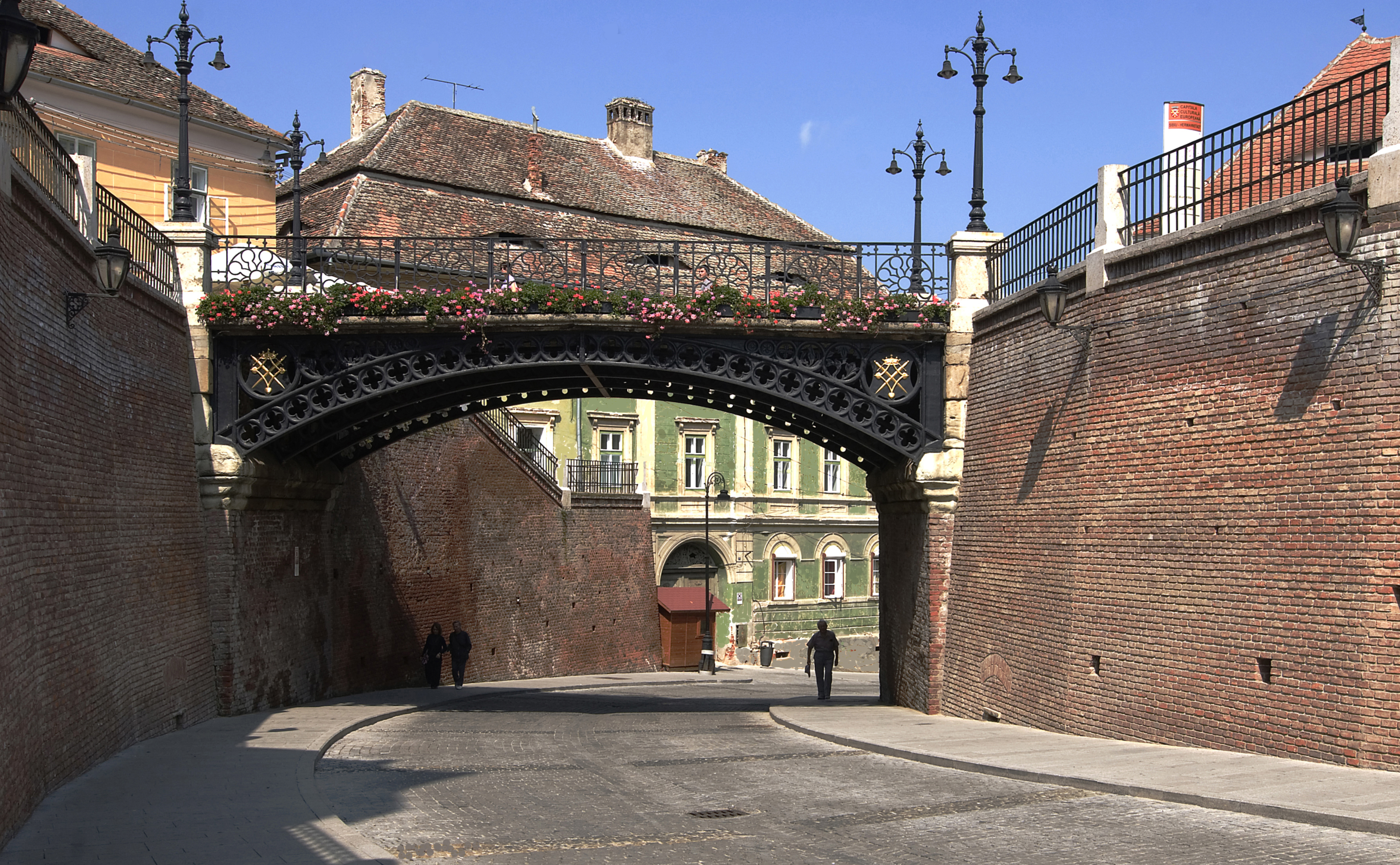 Die gusseiserne Lügenbrücke in Hermannstadt wurde 1859 in der Friedrichshütte bei Laubach in Hessen gegossen. Die Brücke verbindet den Kleinen Ring mit der Stadtpfarrkirche am Huetplatz.